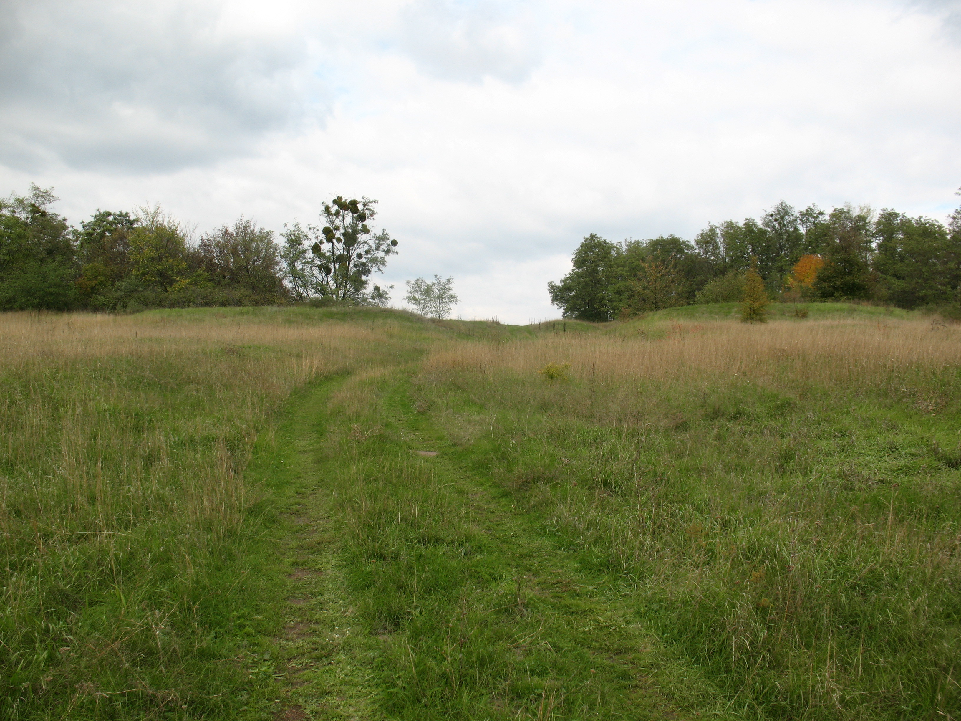 Внешний оборонительный вал перед рвом, заросшим деревьями, русской средневековой крепости Царёв-Борисов. Вид снаружи.